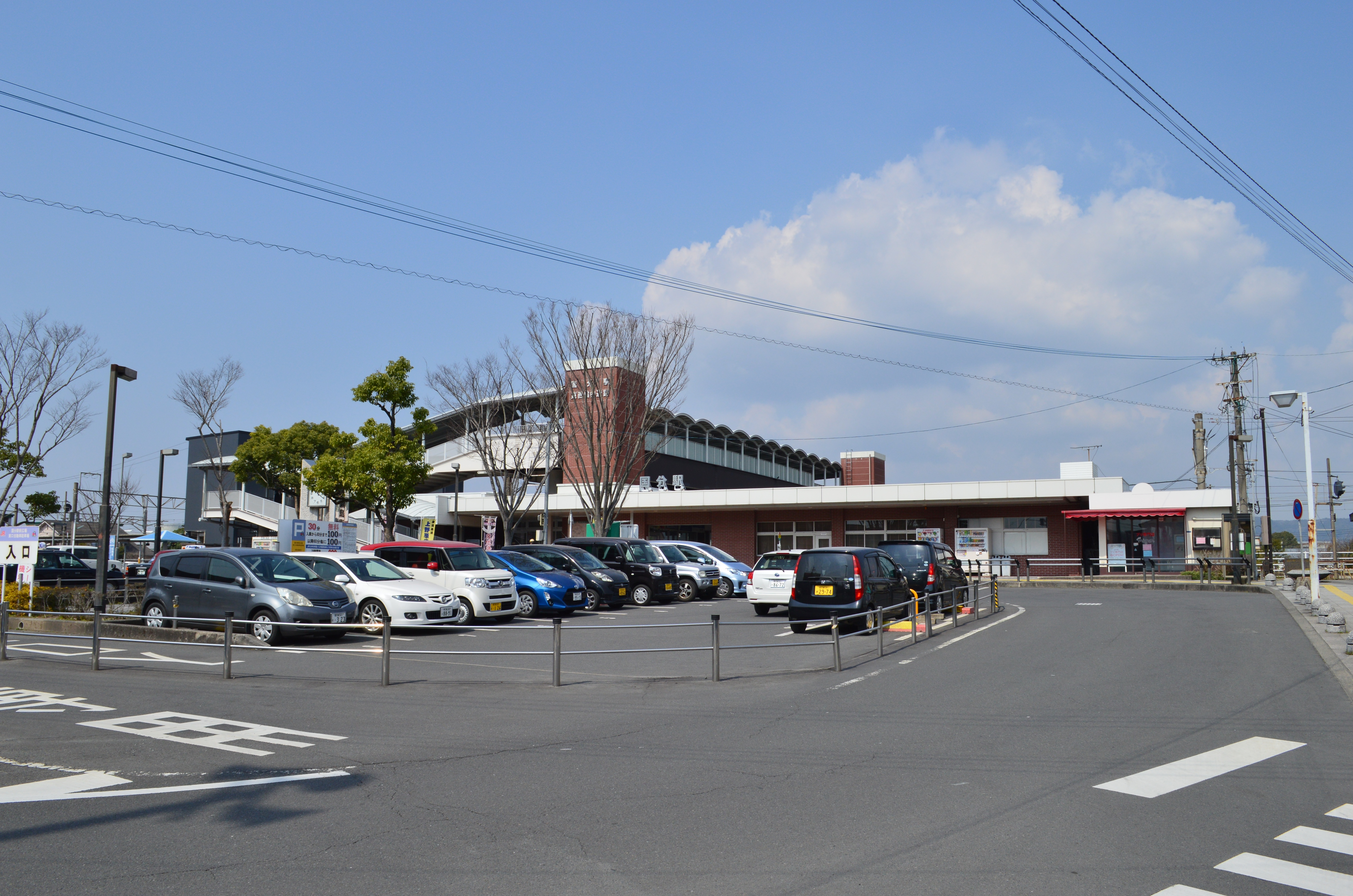 国分駅 (鹿児島県) 駅舎